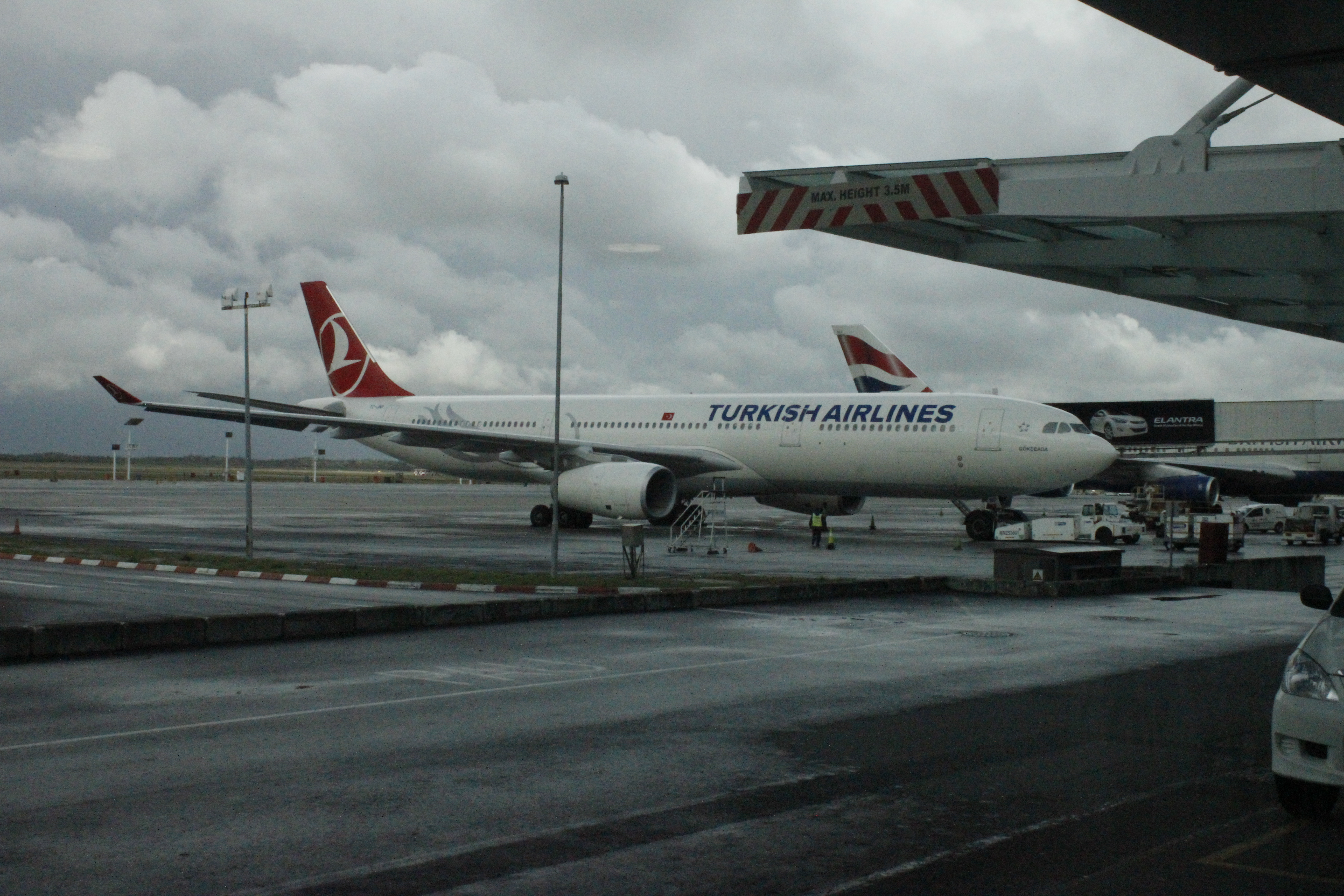 Airbus A340 de Turkish Airlines en el Aeropuerto Internacional de Ciudad del Cabo, Sudáfrica